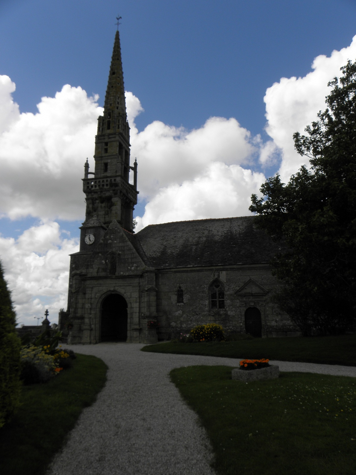 Clocher et flanc sud de l'église Saint-Pierre de Plougourvest (29).